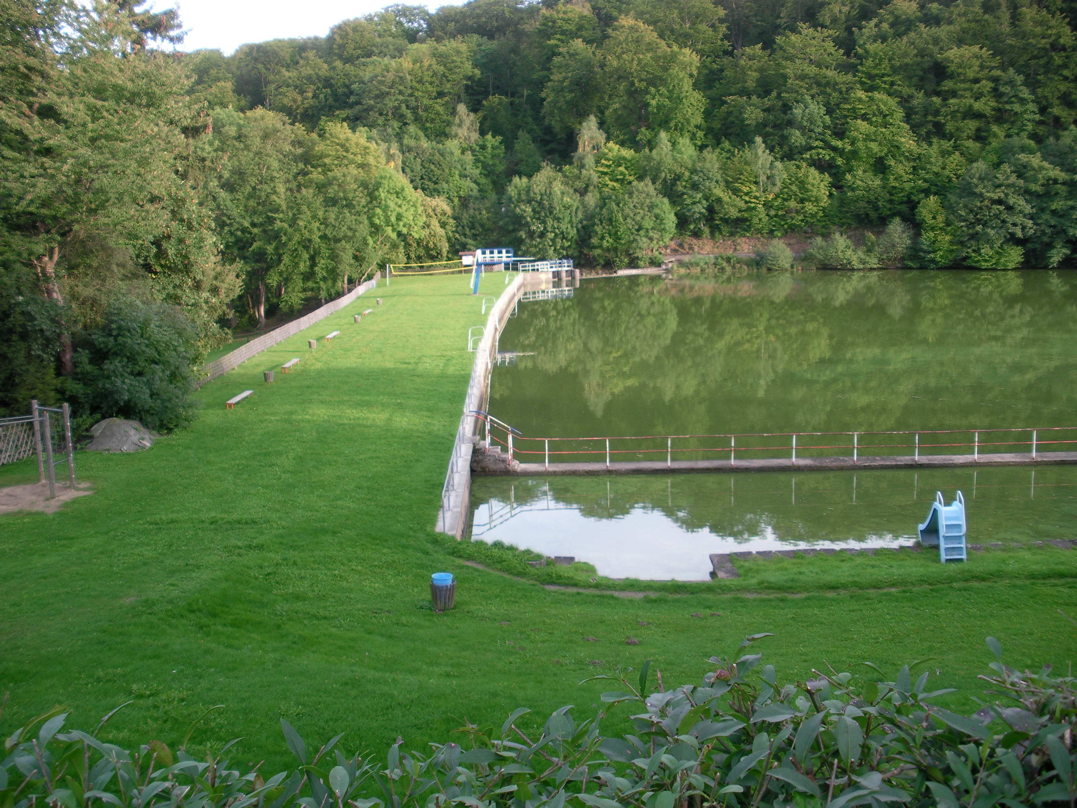 Schwimmbad Bergsee in Güntersberge